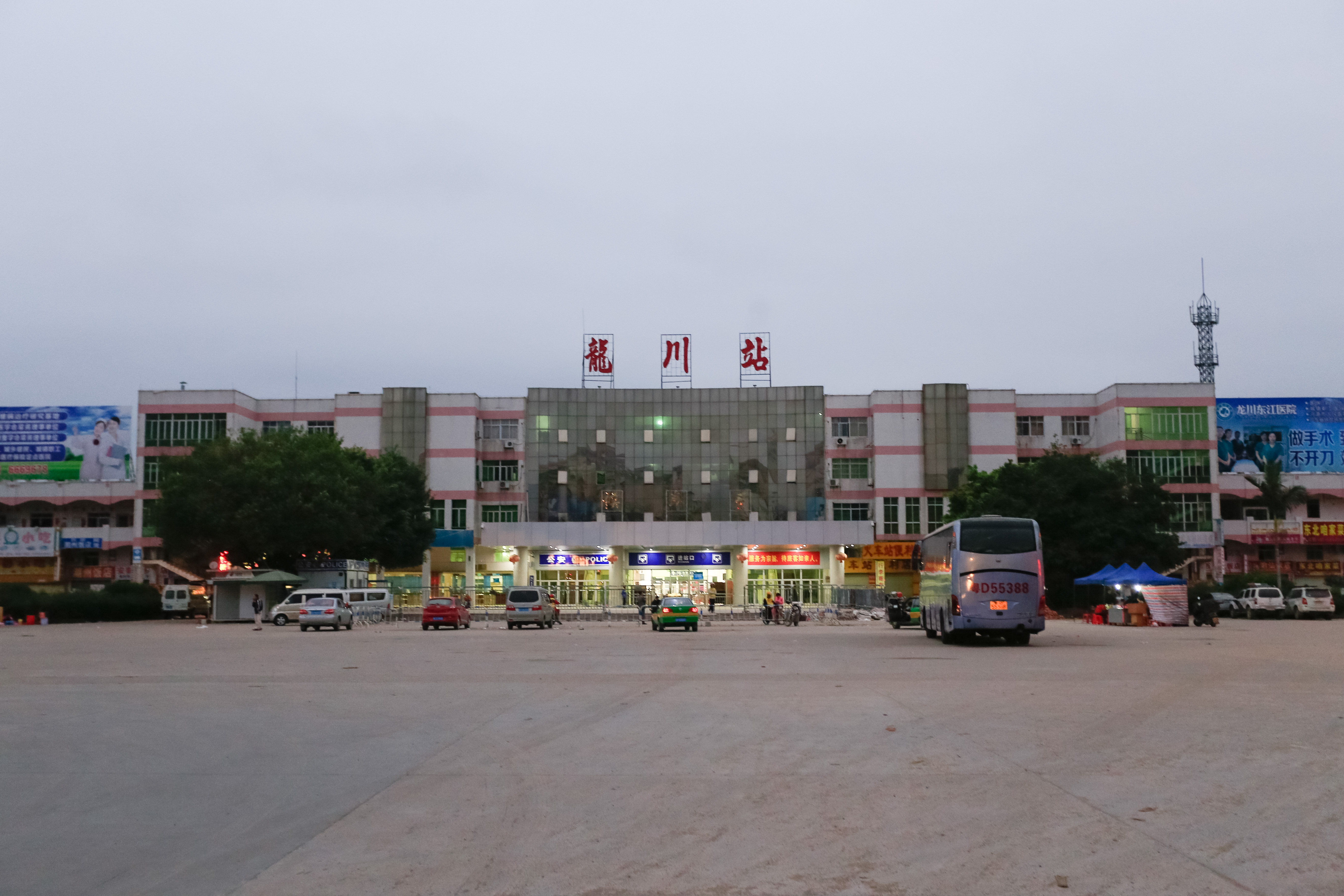 龙川站